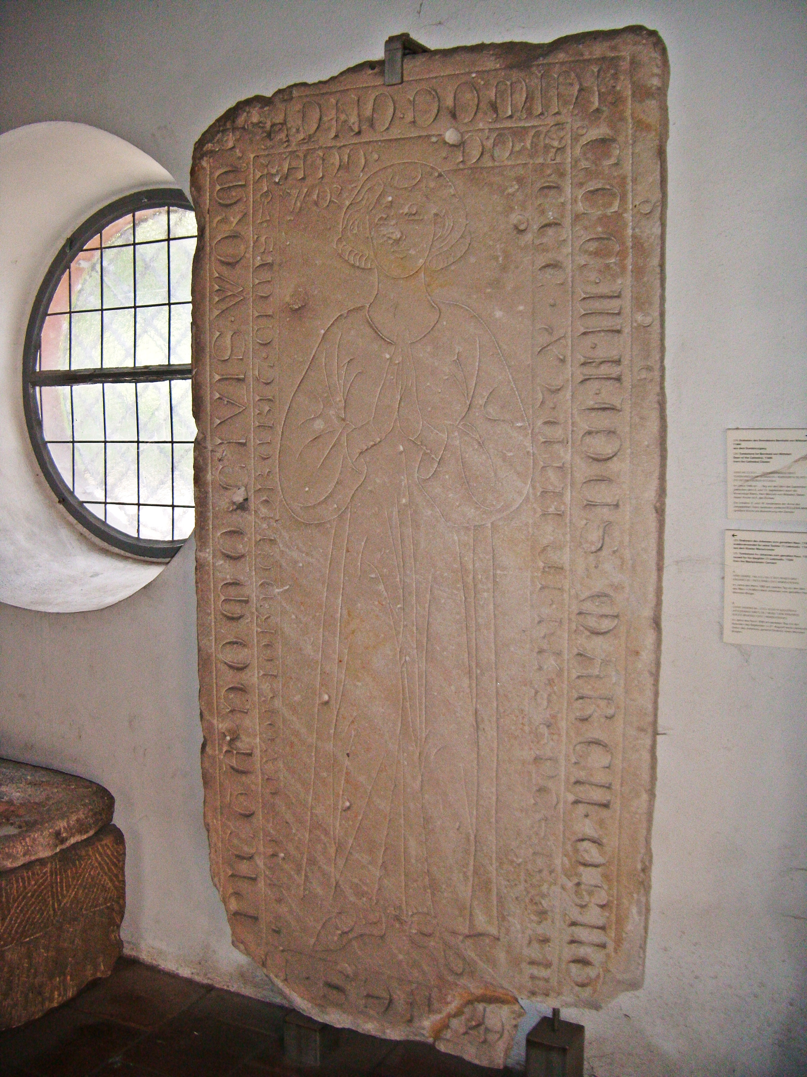 Stadtmuseum Worms, Grabplatte des Wormser Bürgers Johannes vom Gemalten Haus (+ 1303), aus dem Kloster Maria Münster